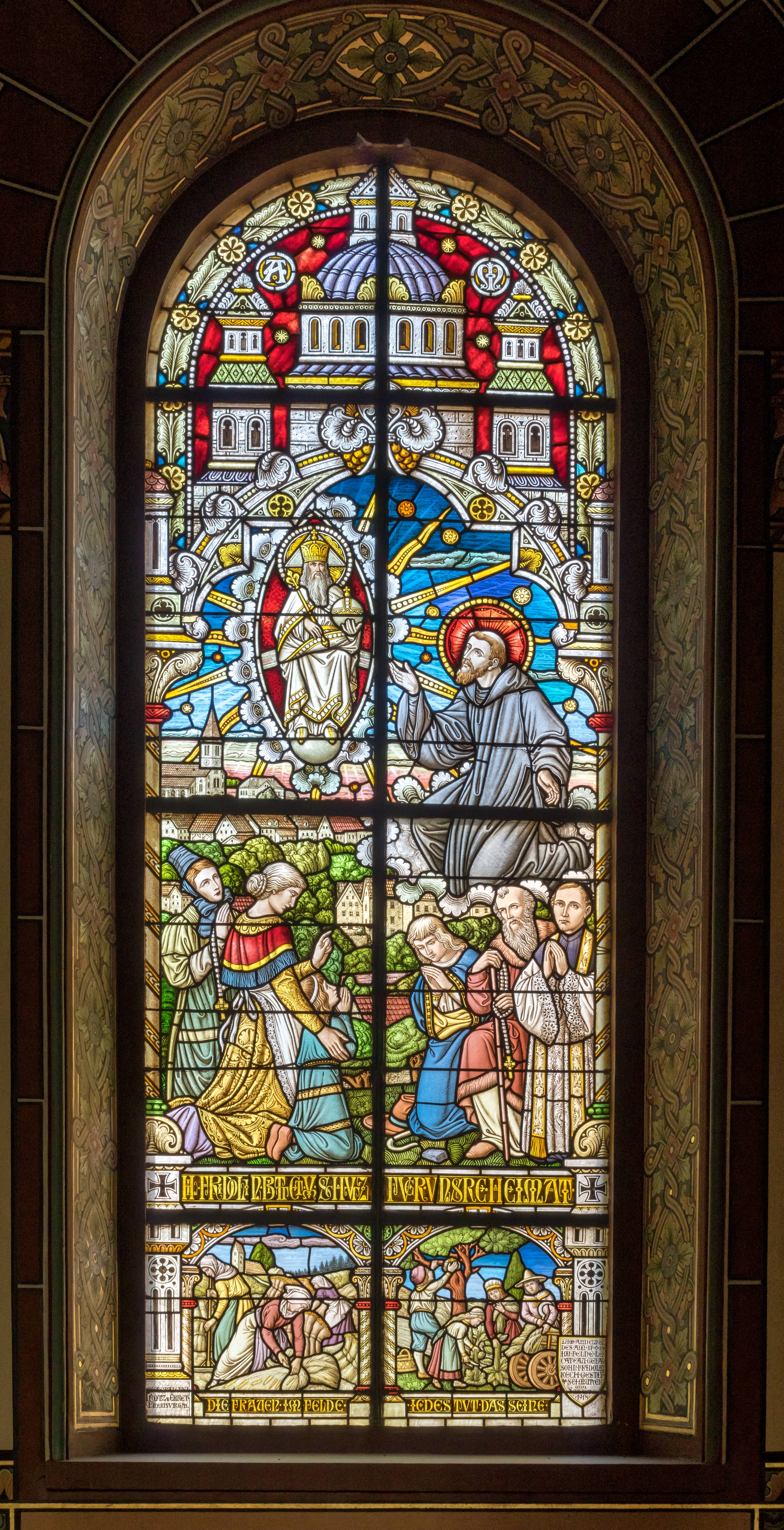 Glasfenster im Langhaus in der Kirche St. Peter und Paul in Bonndorf Inschrift HL FRIDOLIN BITT G[OT]T VM SCHVTZ FVER VNSRE HEIMAT DIE FRAUEN IM FELDE IEDES TVT DAS SEINE ZUM ANDENKEN DES AM 17.9.18 IM FELDE LE CATEAU GEFAL SOHN FRIDOLIN KECH GESTIFTET VON SEI MUTTER UND SCHWESTER 1918 GLASMALEREI Protz u. EHRET FREIBURG/BR